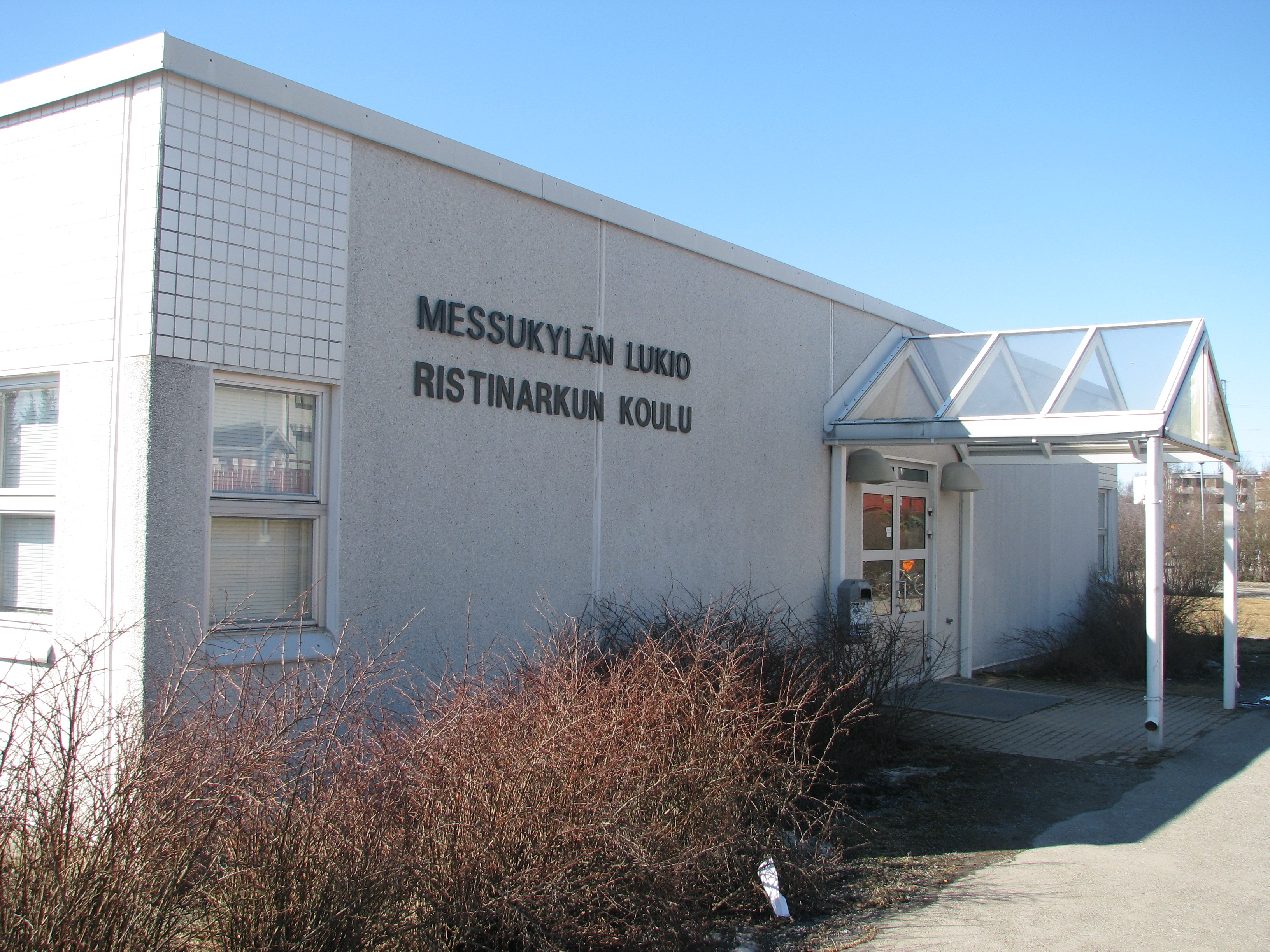 Messukylän lukio vuonna 2010.